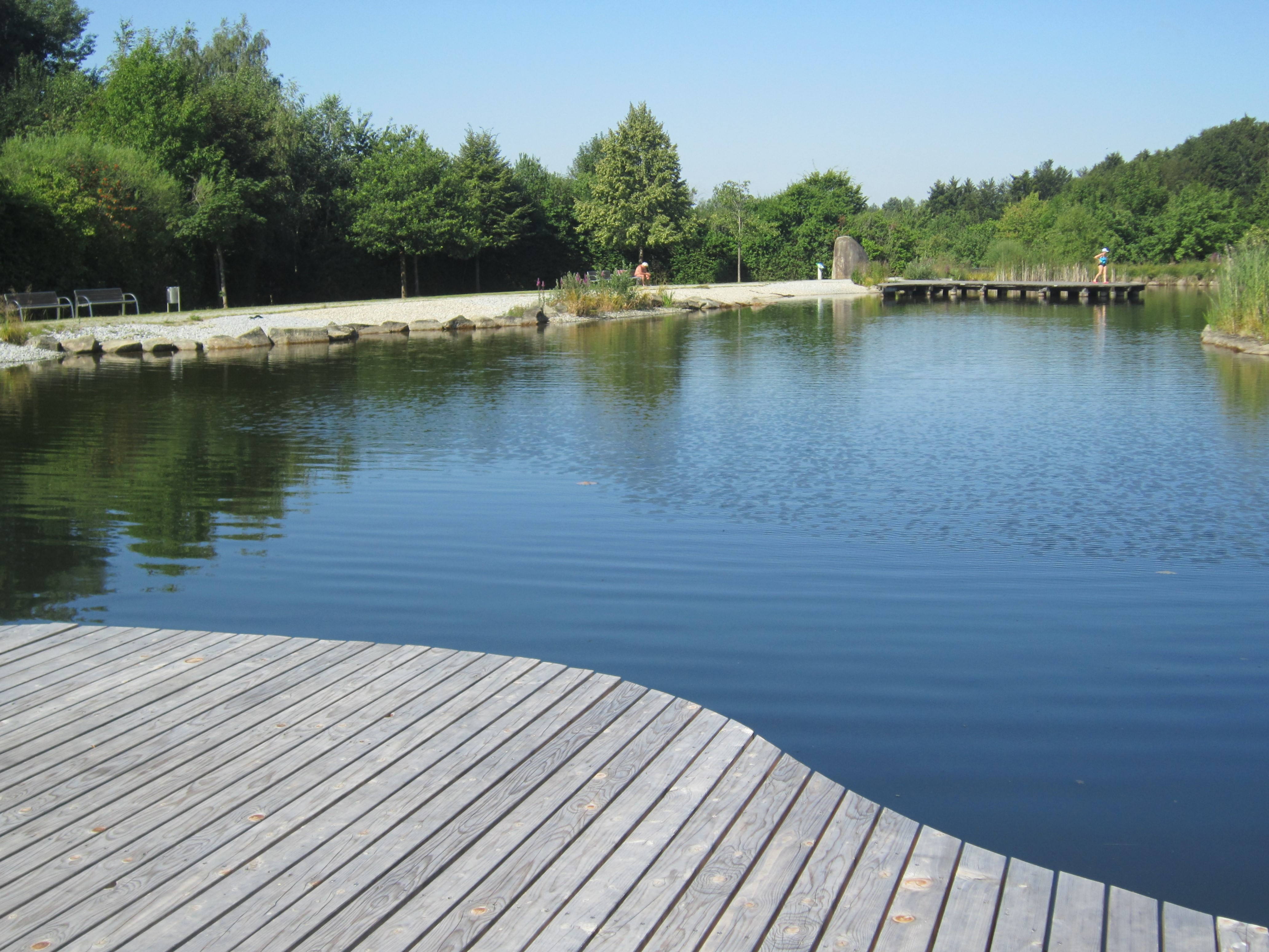 Deutschlands einziger öffentlicher Feng Shui-Kurpark in Lalling (Landkreis Deggendorf in Niederbayern)